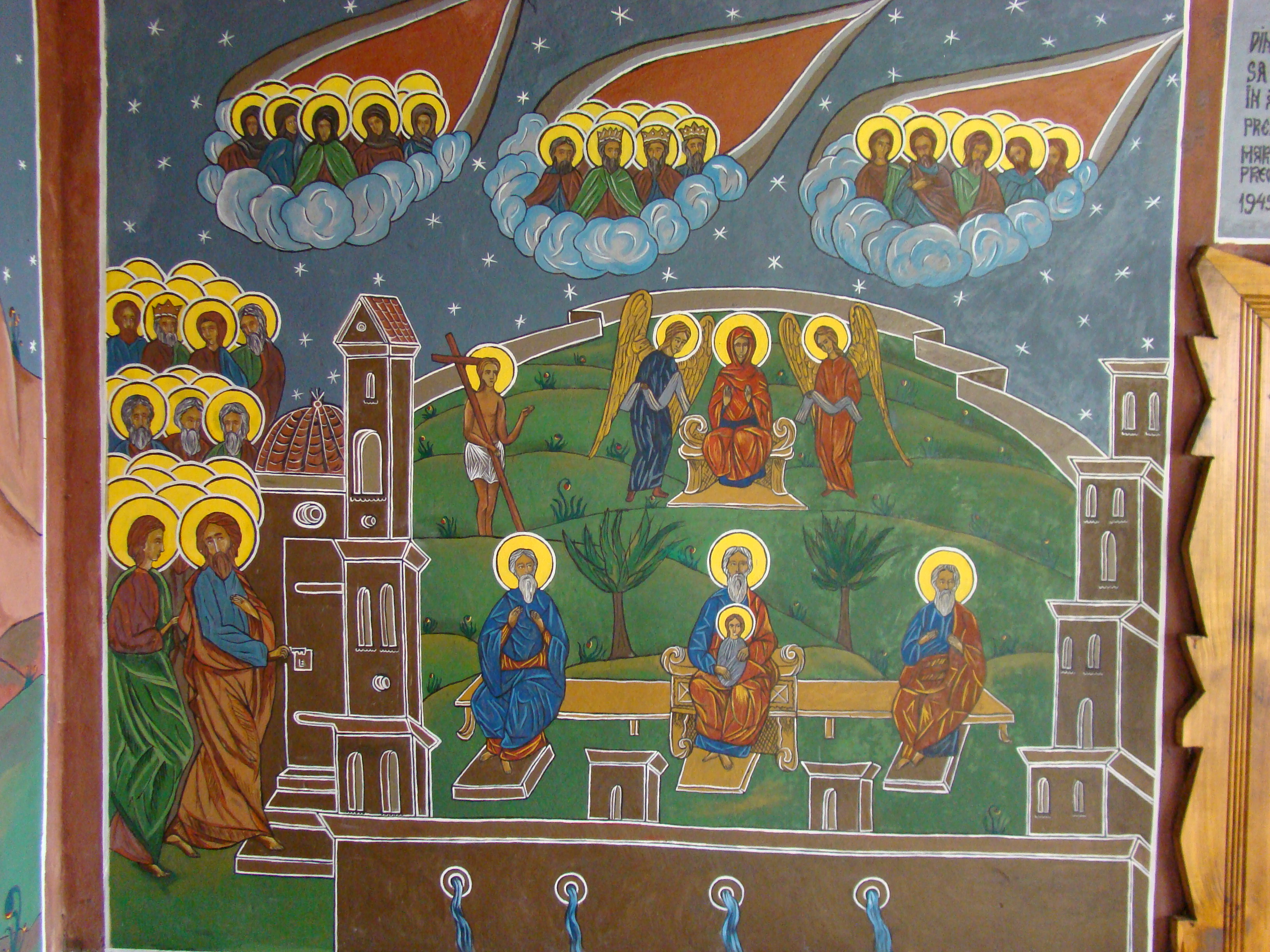 Biserica de lemn „Nașterea Maicii Domnuluii” din Gornovița, județul Gorj